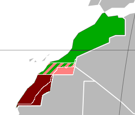 Рио-де-Оро (расположение)